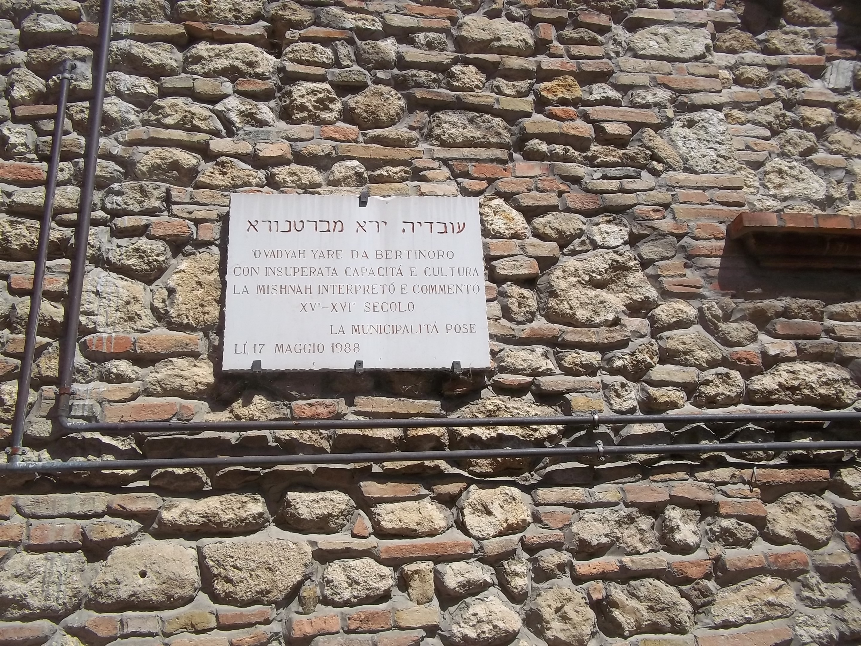 העיר של רבי עובדיה מברטנורה